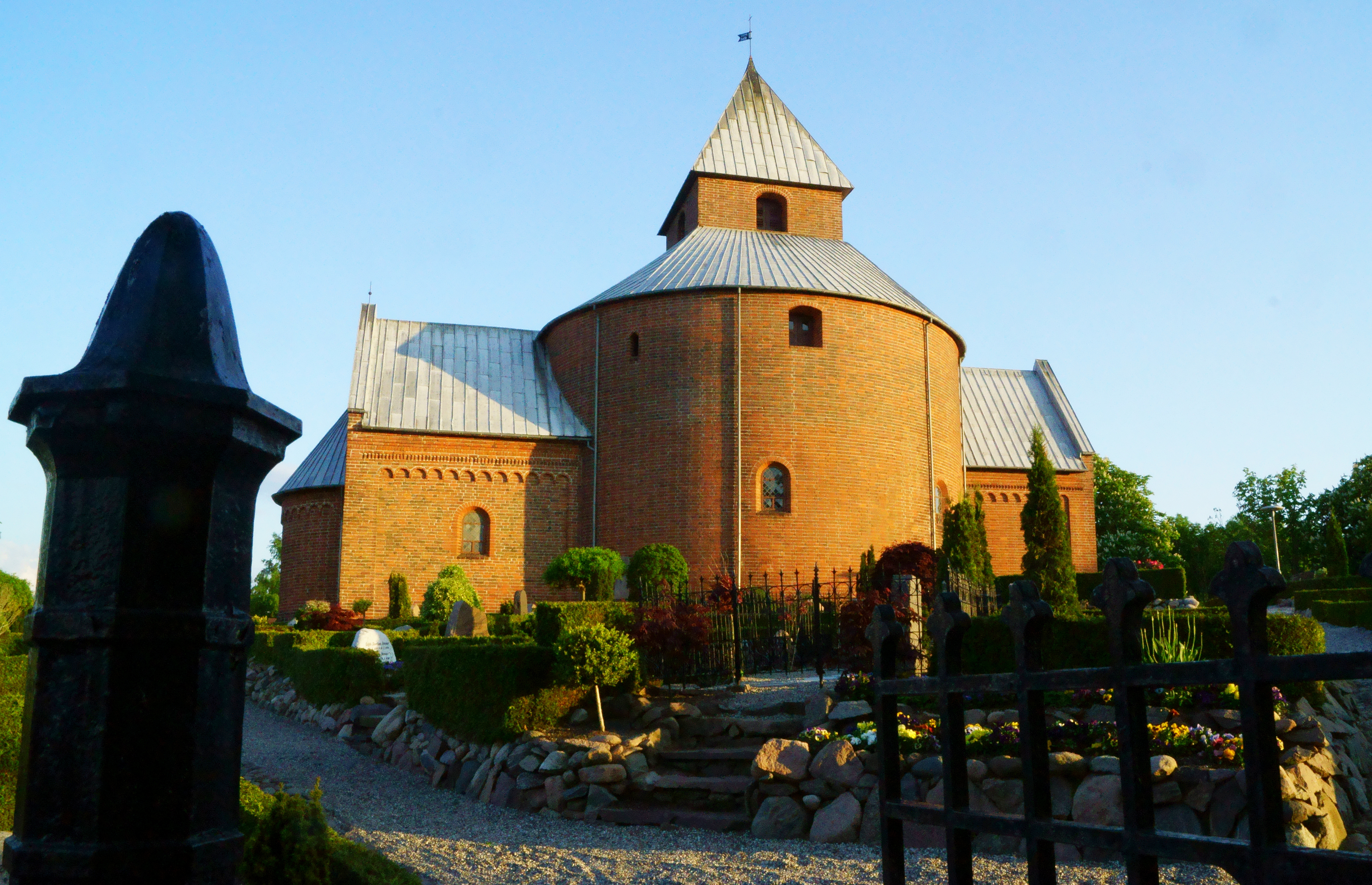 Thorsager Kirke